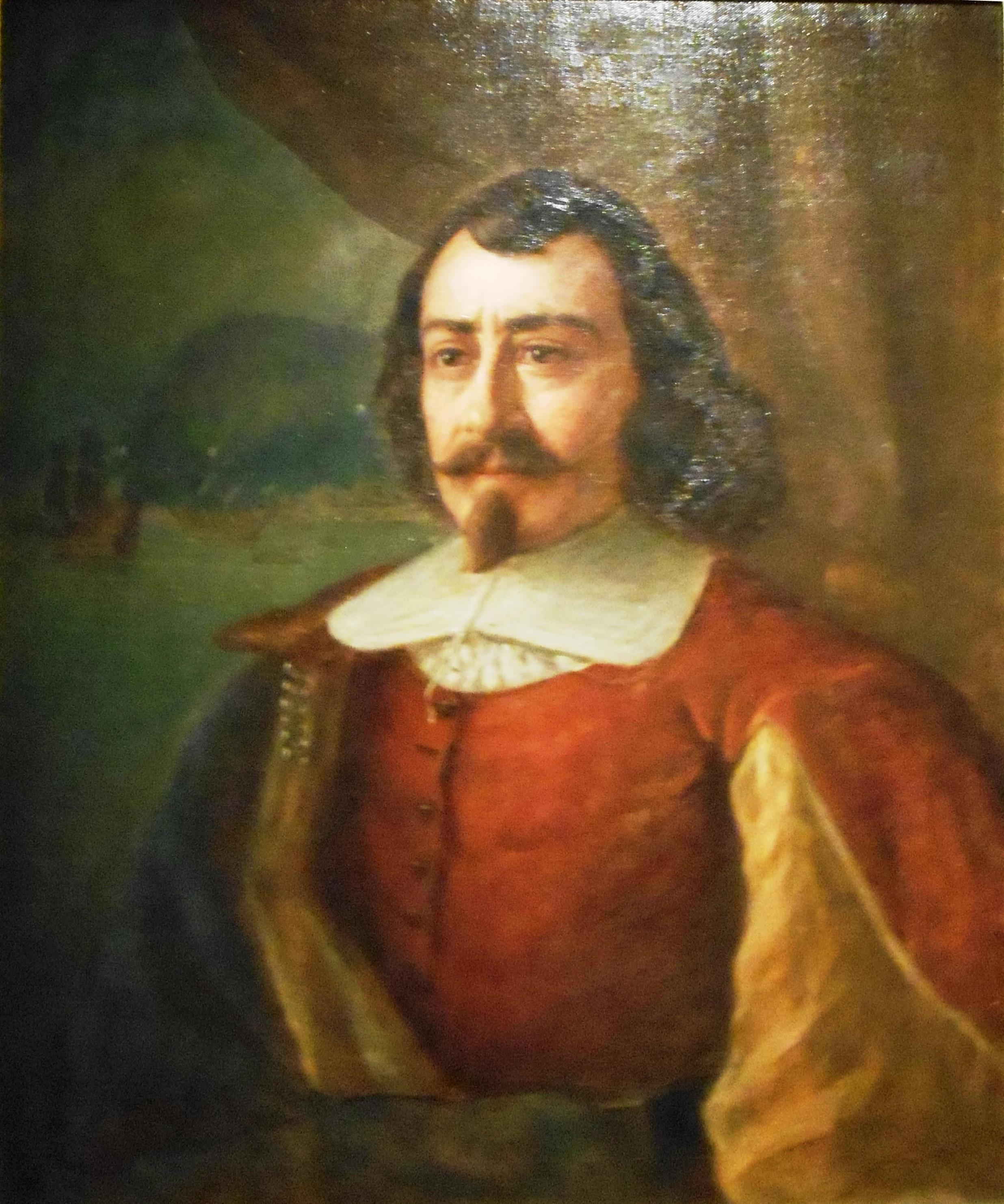 Samuel de Champlain (1567-1635), huile sur toile